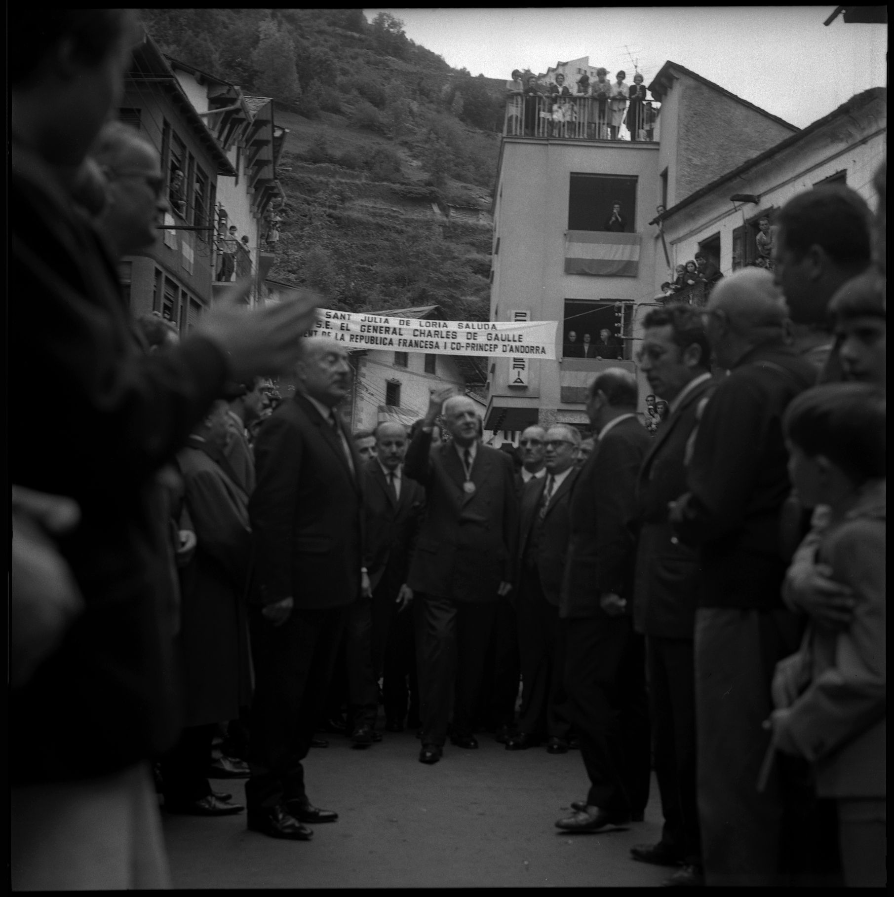 Sant-Julia de Loria en Andorre. 23-24 Octobre 1967. Vue du Général De Gaulle dans les rues de Sant-Julia de Loria en Andorre.